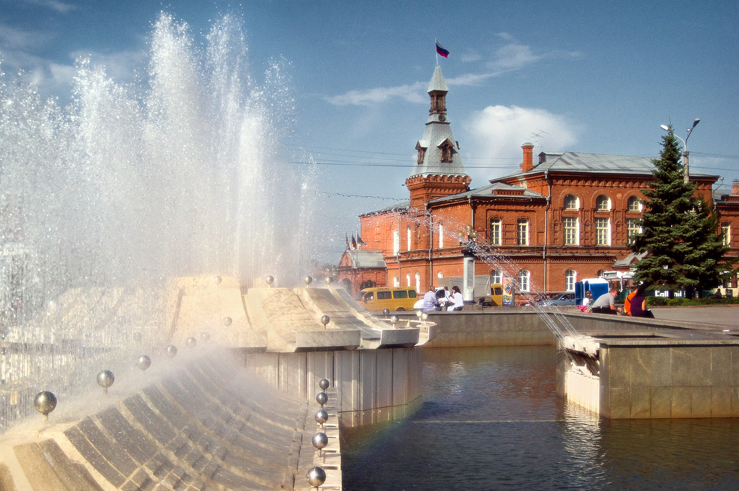 Омск. Фонтан на театральной площади, городской совет